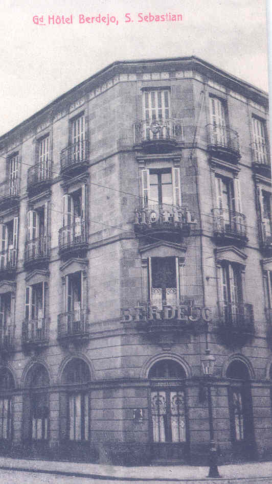 hotelaren Ikuspegi orokorra